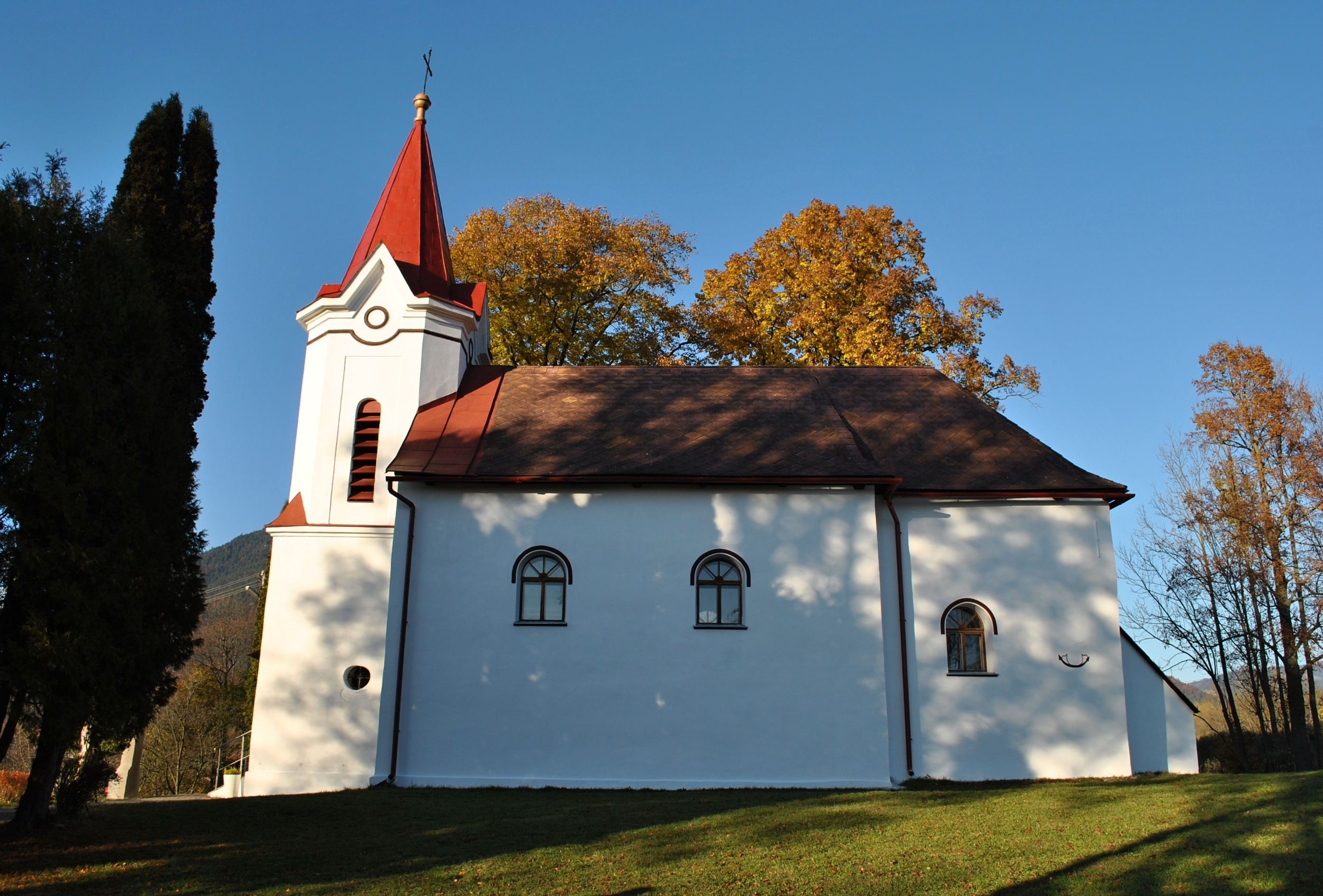 Prosiek, okr. Liptovský Mikuláš - kostol Sv. Alžbety - celkový pohľad